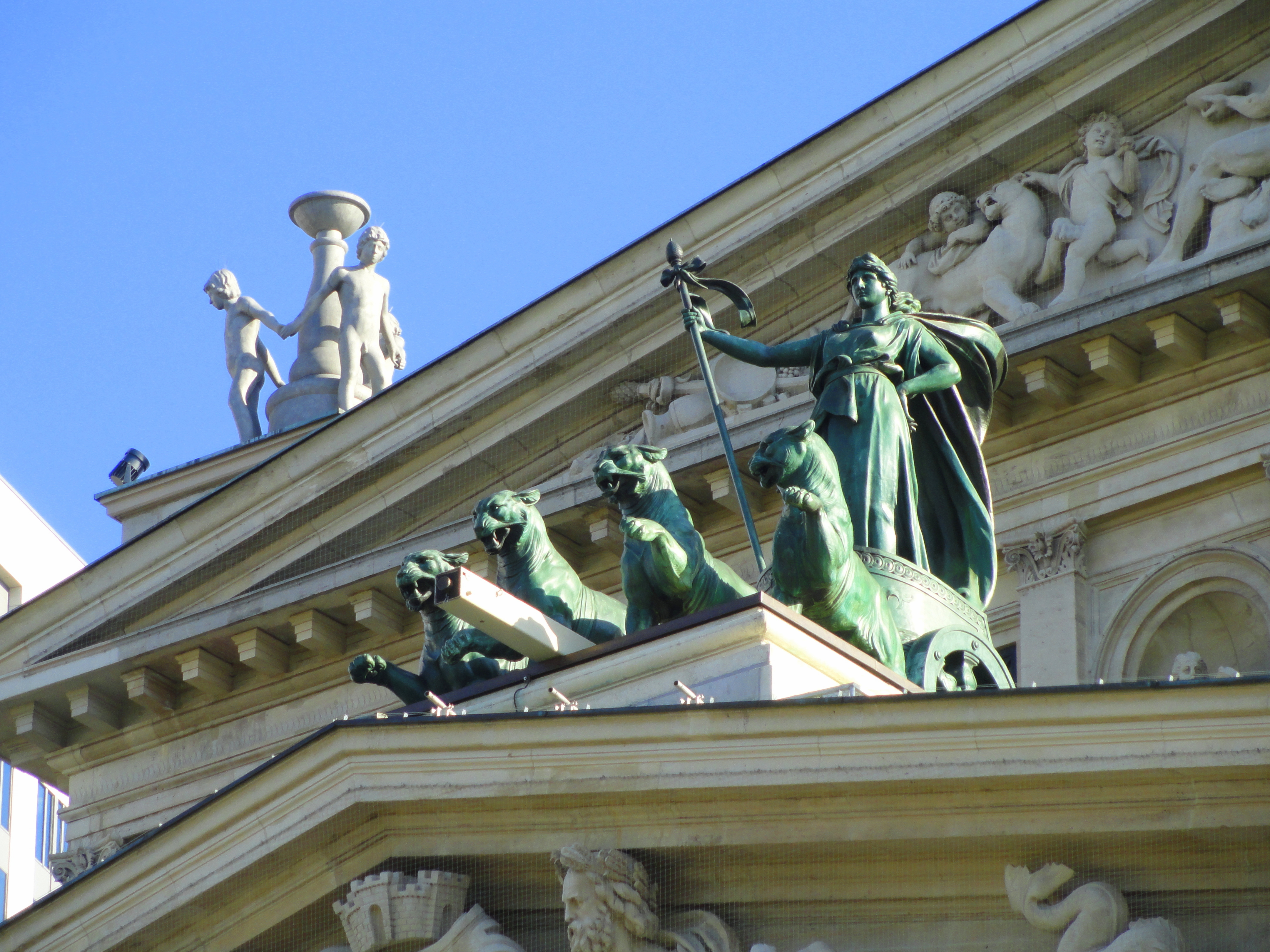 Alte Oper, Frankfurt am Main, Deutschland. Kleiner Giebel und Panther-Quadriga. Sie befand sich ursprünglich am alten Schauspielhaus.